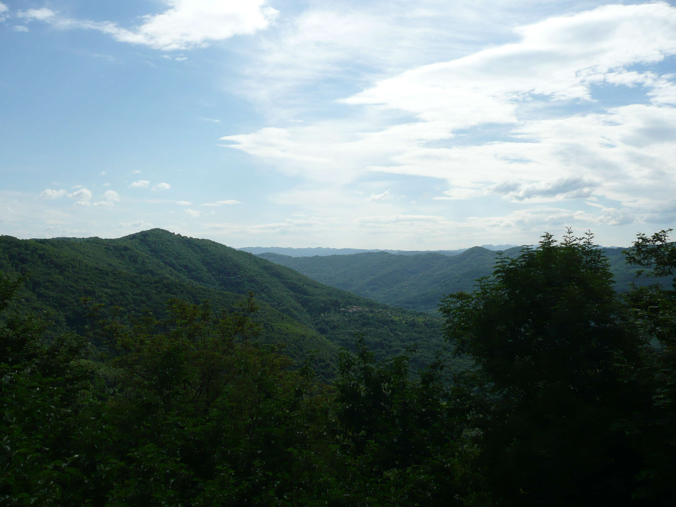 Castelmonte